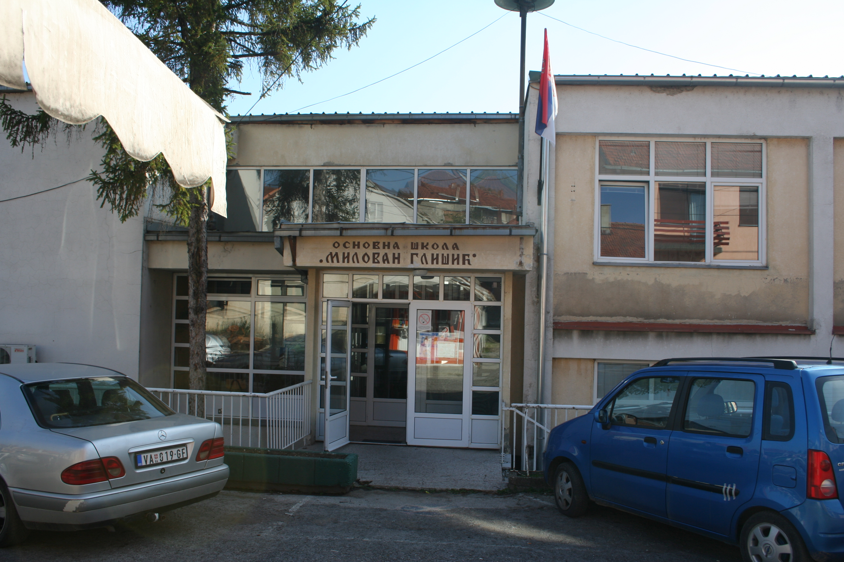 OŠ Milovan Glišić Valjevo